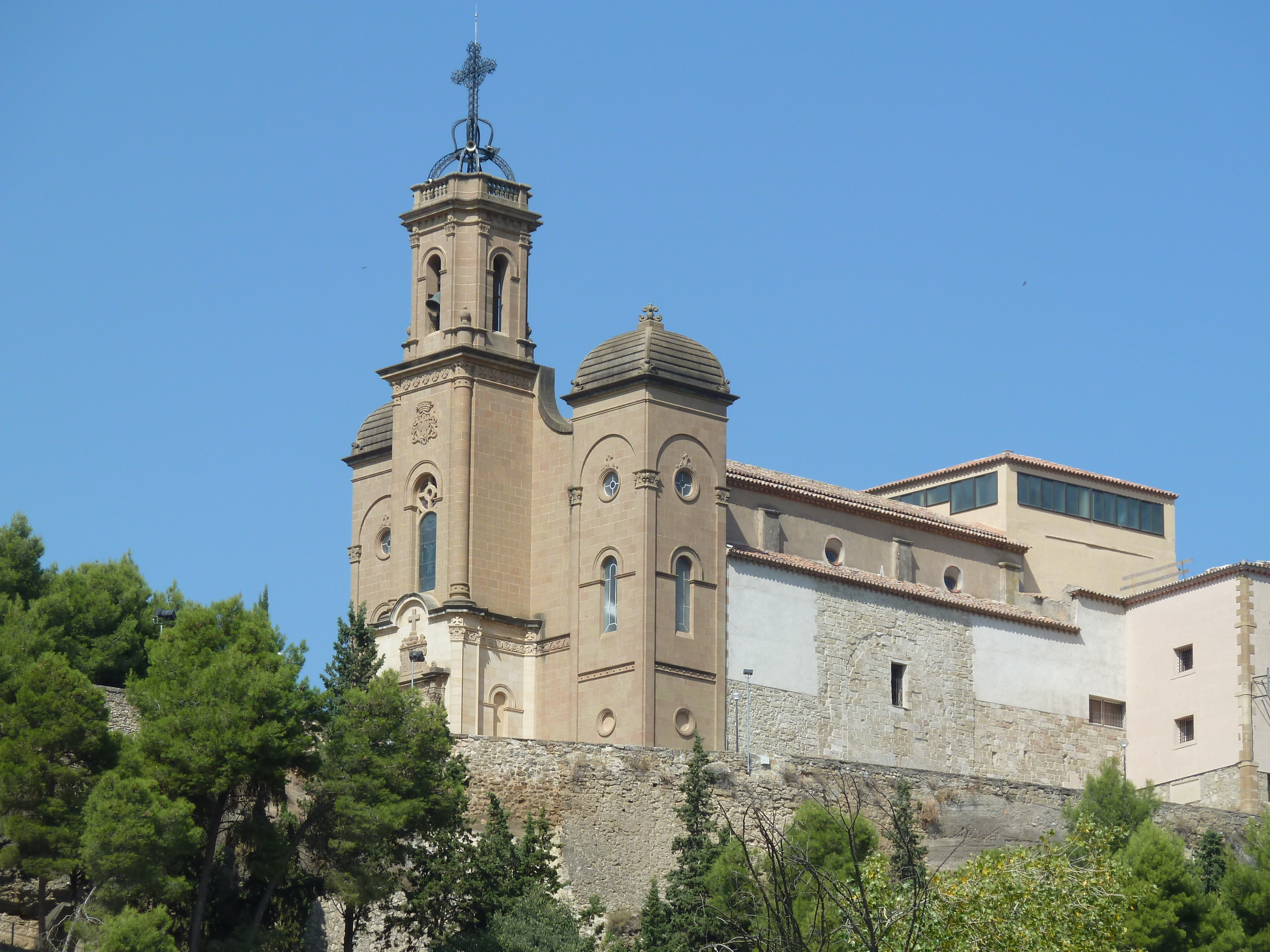 Balaguer